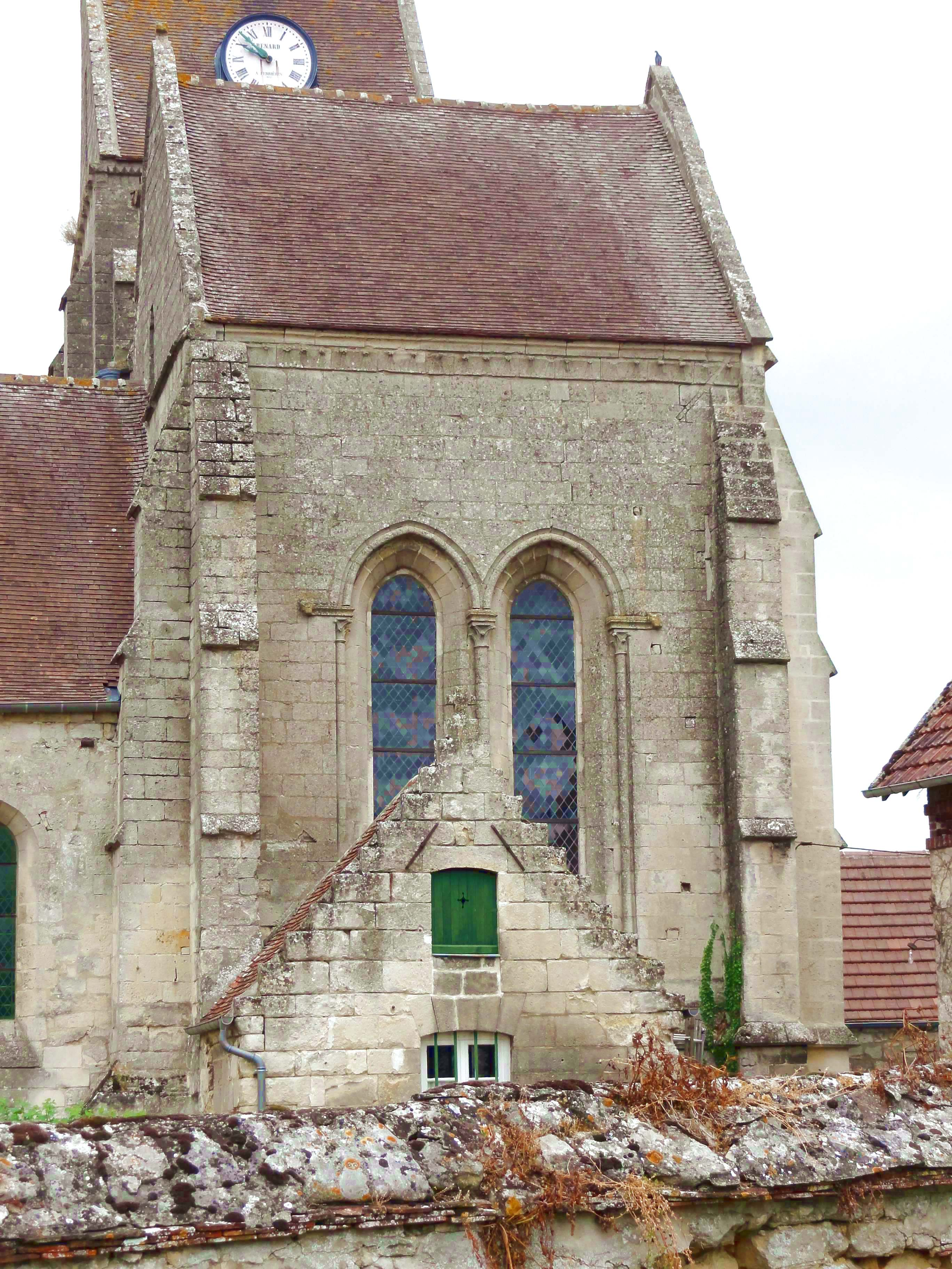 Église Saint-Martin-et-Saint-Léonard de Vez - voir titre.